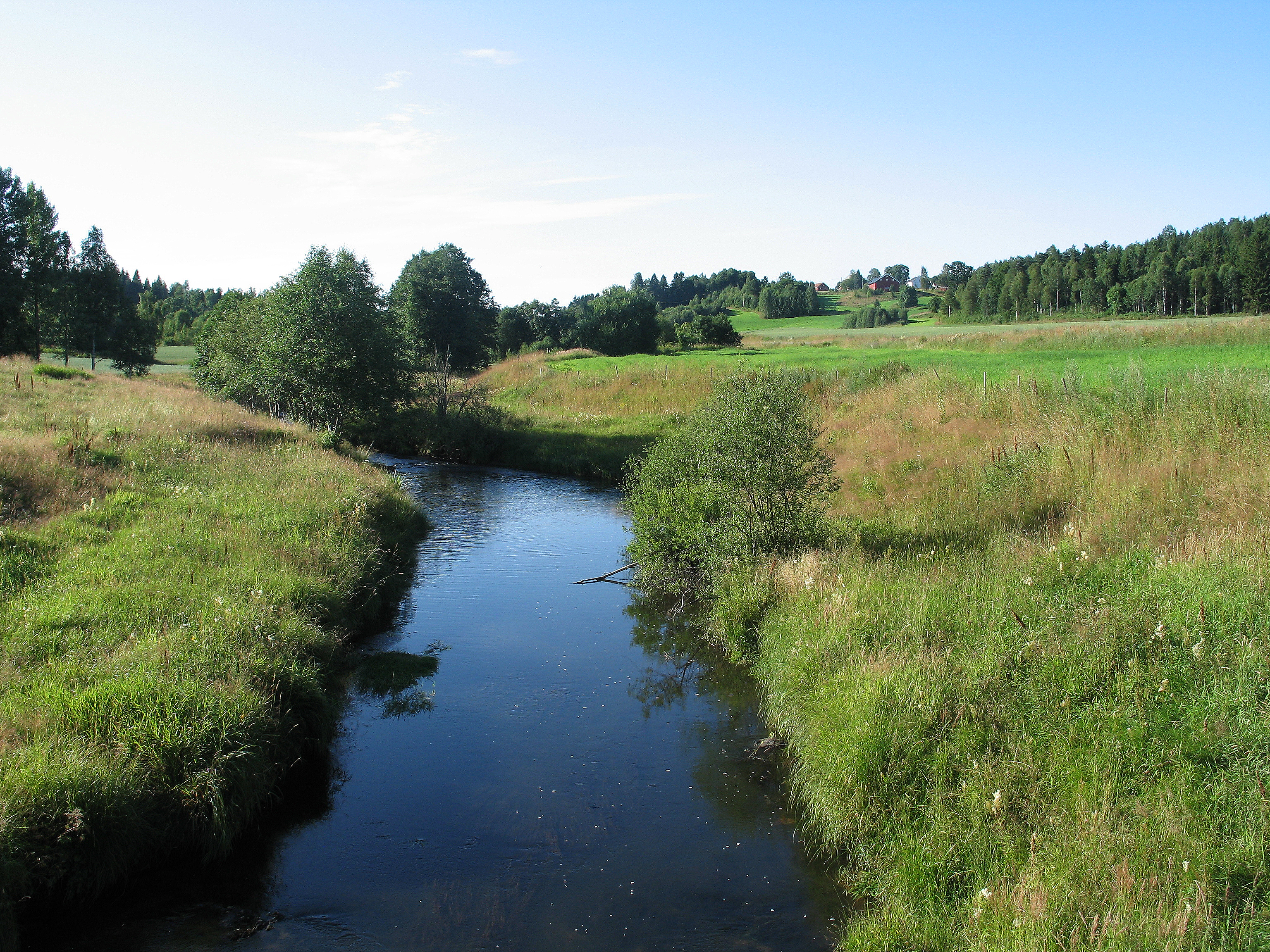 Merkedamselva i Andebu kommune i Vestfold